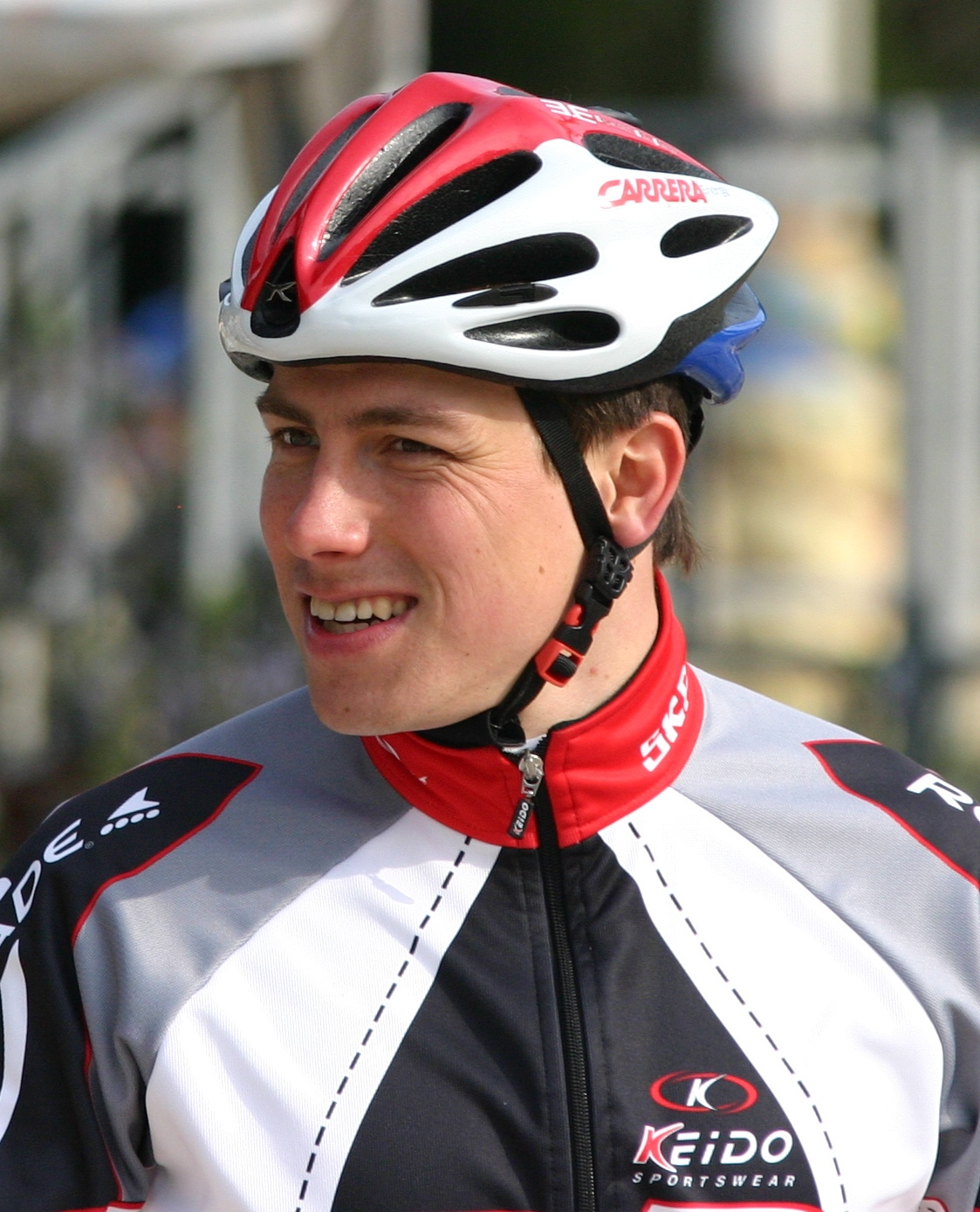 Trainer im Inline-Skating und Eisschnelllauf